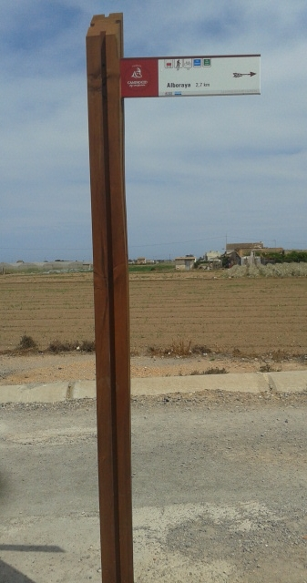 Senyalització vertical del Camí del Cid a Meliana